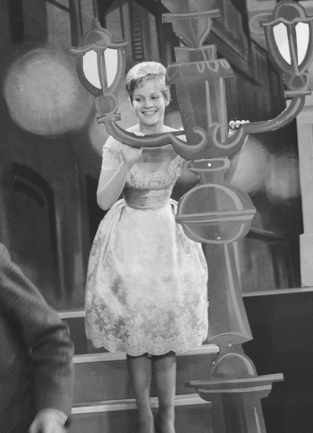 Televisie Weekendshow, Heidi Bruhl